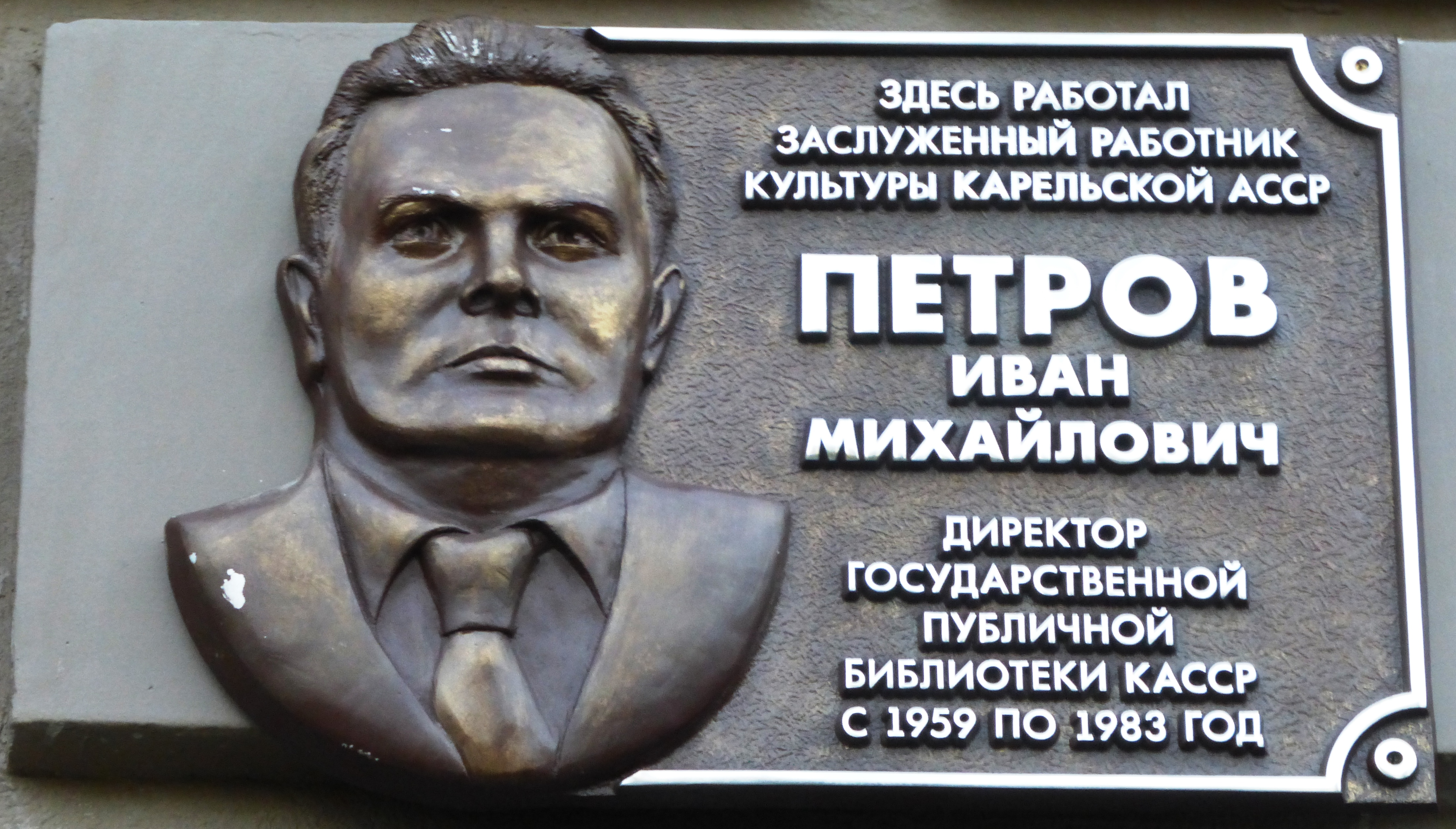 Мемориальная доска заслуженному работнику культуры Карельской АССР Петрову Ивану Михайловичу (1914—1985) на здании Национальной библиотеки Республики Карелия по ул. Пушкинской в Петрозаводске. Установлена в 2018 году.